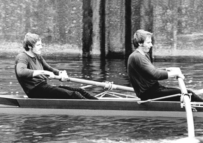 Jörg Landvoigt, Bernd Landvoigt ADN-ZB Gahlbeck 15.4.78-St.-Leipzig: Saisonauftakt im Rudern- Mit einem Rekordergebnis von 523 Aktiven in 387 Booten bei der 10. Leipziger Langstreckenregatta auf dem Elster-Saale-Kanal bei Leipzig war die gesamte DDR-Spitze am Start. Im Rudern der Männer über 9000 Meter bewiesen die Brüder Landvoigt vom Dynamo Potsdam mit dem Sieg in diesem Rennen ihre gute Form.